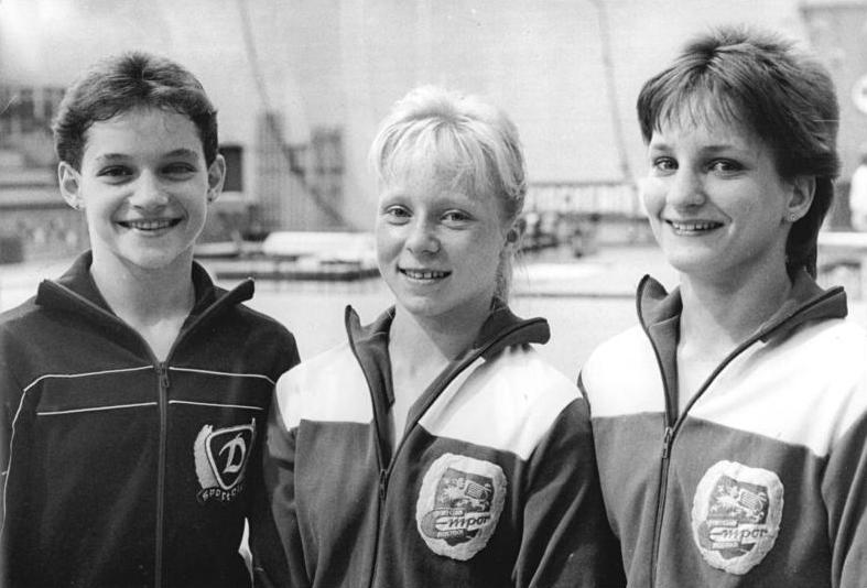 Antje Wilkenloh, Bärbel Wielgoß, Diana Schröder ADN-ZB Thieme 17.8.89 Karl-Marx-Stadt: DDR-Meisterschaften im Turnen-Nach dem Pflichtprogramm der Frauen zeigen die drei Erstplazierten strahlende Gesichter. Erwartungsgemäß führt Antje Wilkenloh (Mitte) das zölfköpfige Teilnehmerfeld an. Bärbel Wielgoß (rechts-beide SC Empor Rostock) liegt auf Platz zwei und die erst 13jährige Berliner Dynamo-Sportlerin Diana Schröder (links), die für die WM noch nicht startberechtigt ist, knapp dahinter.